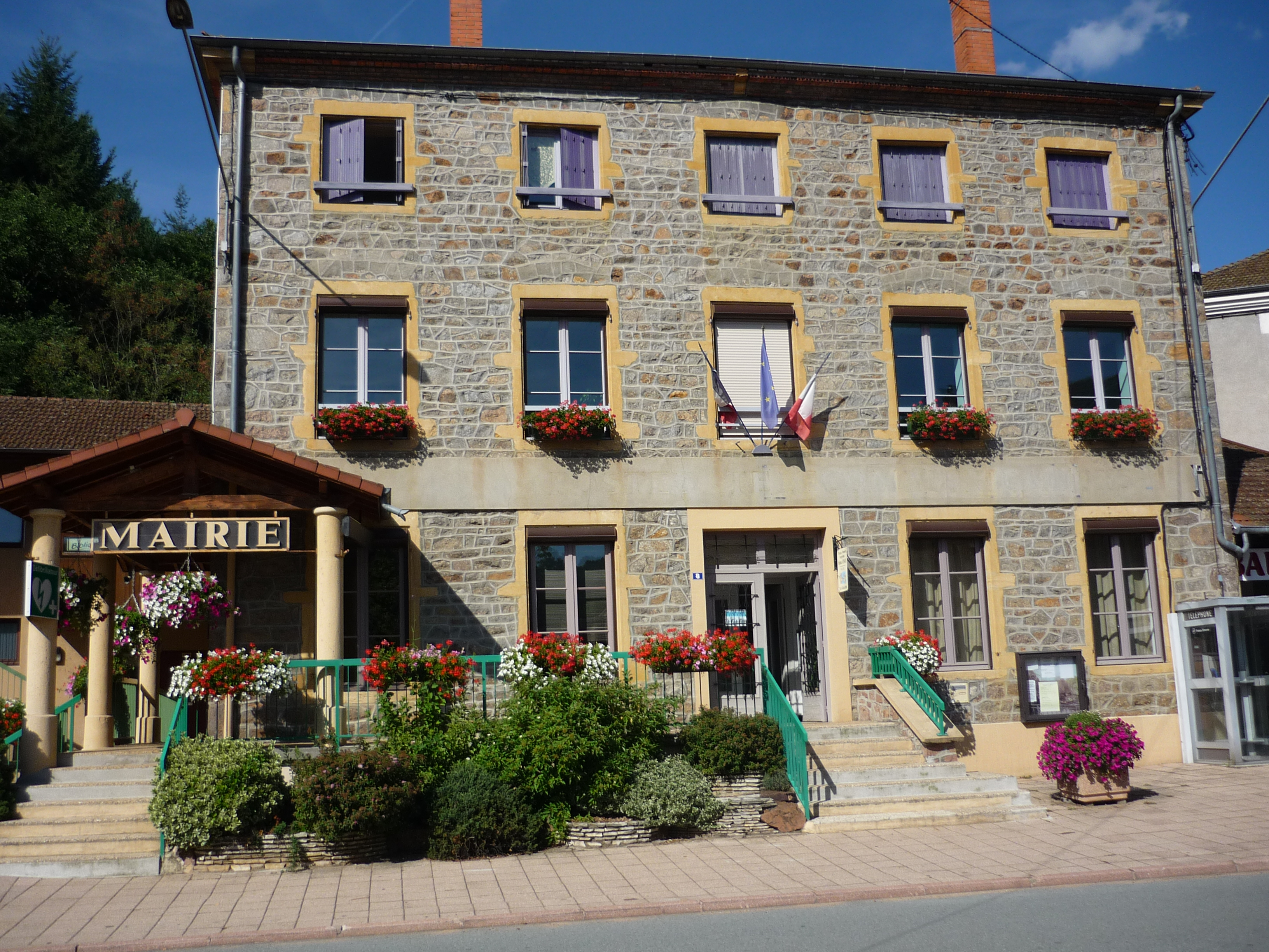 Mairie de Saint-Victor-sur-Rhins dans le département de la Loire